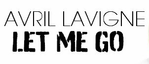 Logo Let Me Go